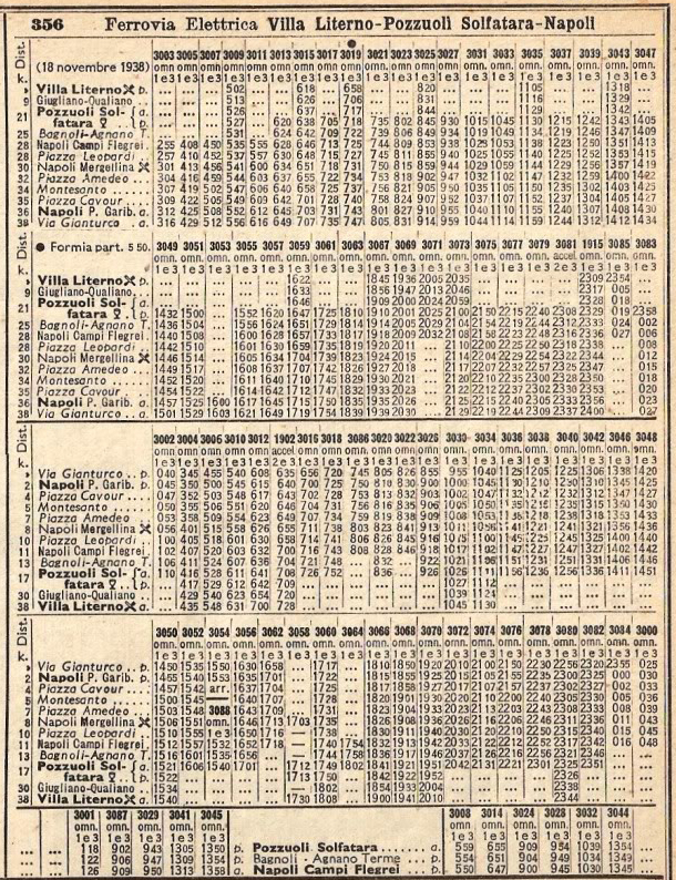 Orario della metropolitana FS di Napoli del 1938